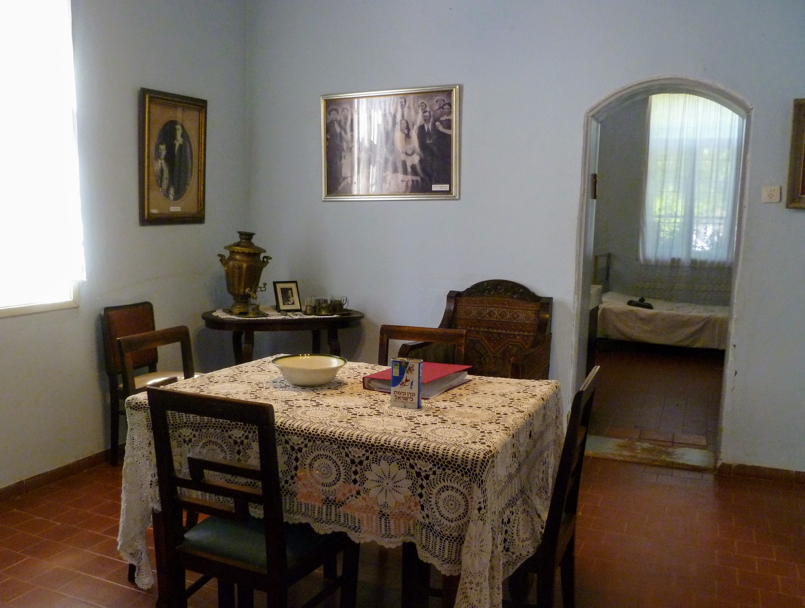 אחוזת דוברובין_שחזור בית